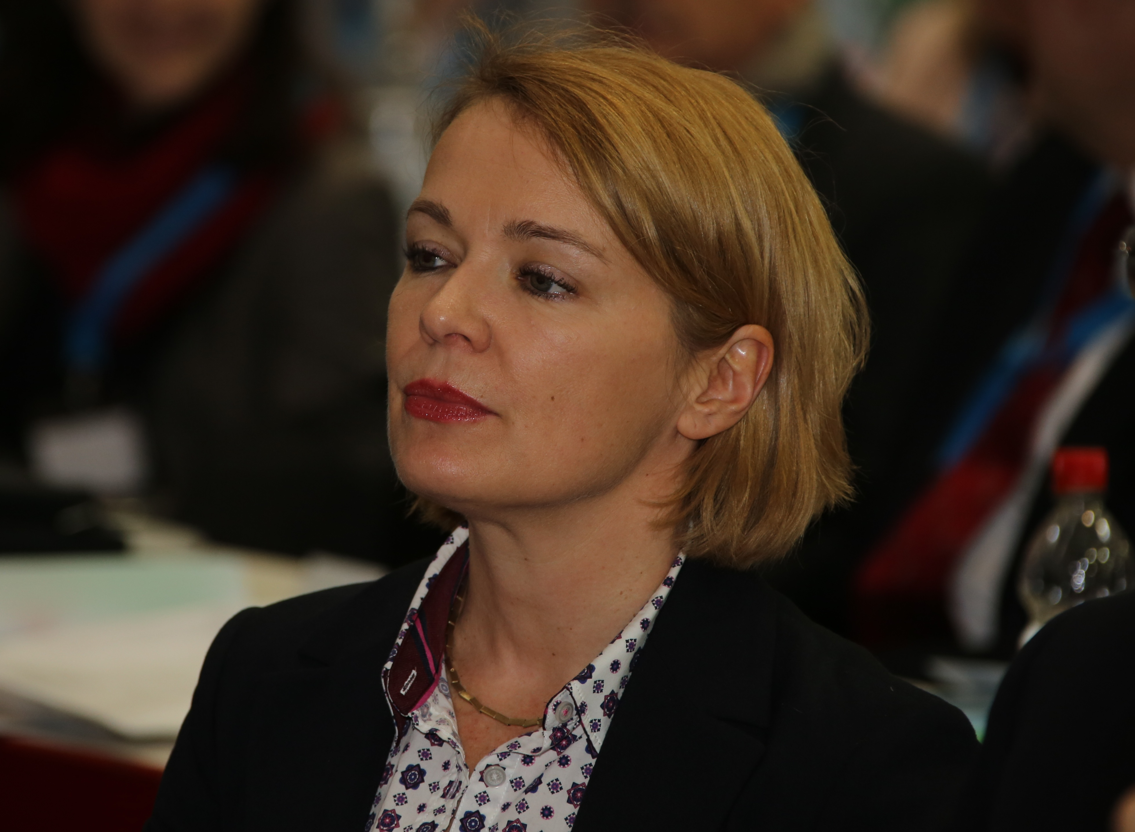 Ulrike Trebesius, AfD Parteitag 25.1.2014 in Aschaffenburg